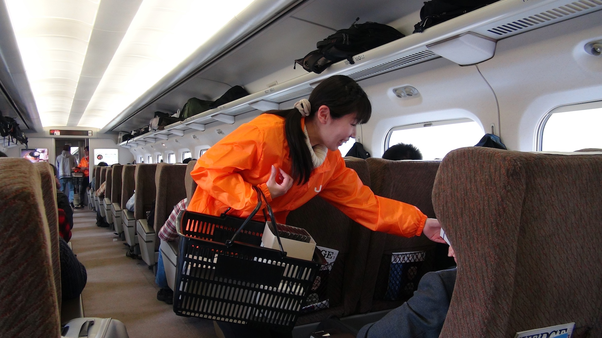 のぞみ329号（JR東海最終運転）車内 （2012年3月16日、J57編成、316−56）※GPS情報は出発前の計測位置になっています。